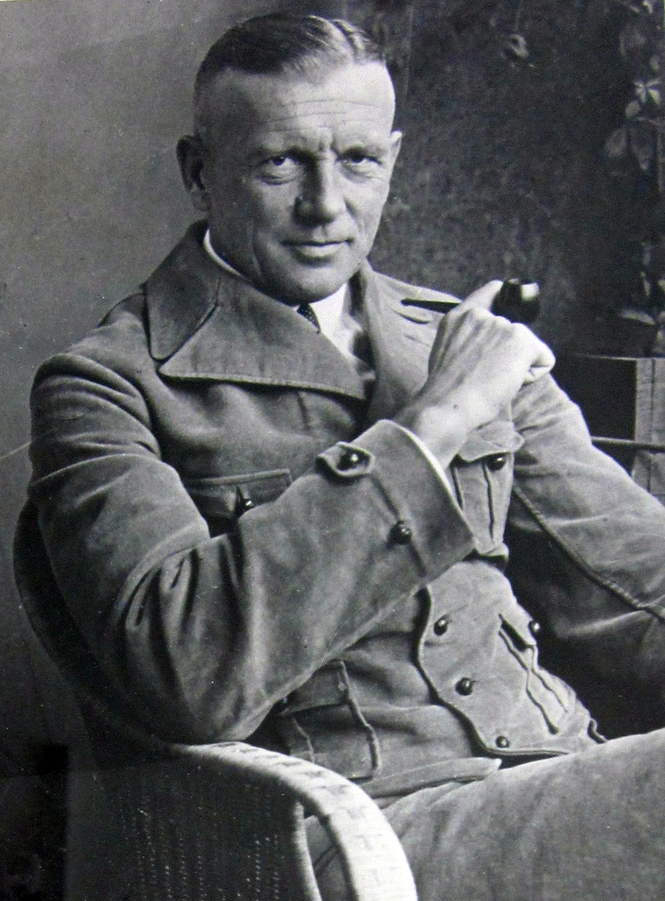 NS-Opfer Major Hans Georg Oskar Schulz (5.8.1886, Speichrow - Freitod vor der Verhaftung aufgrund § 175 StGB am 21.4.1937 im Heeresverwaltungsamt, Berlin), von 1920 bis zum 30.6.1934 Ministerialrat in der Adjutantur des Reichswehrministeriums und von 1934 bis 1936 Leiter des Bauausschusses des Olympischen Dorfes Berlin der Olympischen Sommerspiele 1936, Aufsichtsratsvorsitzender der Wohnbau G.m.b.H. und Vertrauter der Reichswehrminister Otto Gessler und Wilhelm Groener. Das Foto zeigt Schulz auf dem Balkon seiner Wohnung in der Leibnizstraße 86 in Berlin.